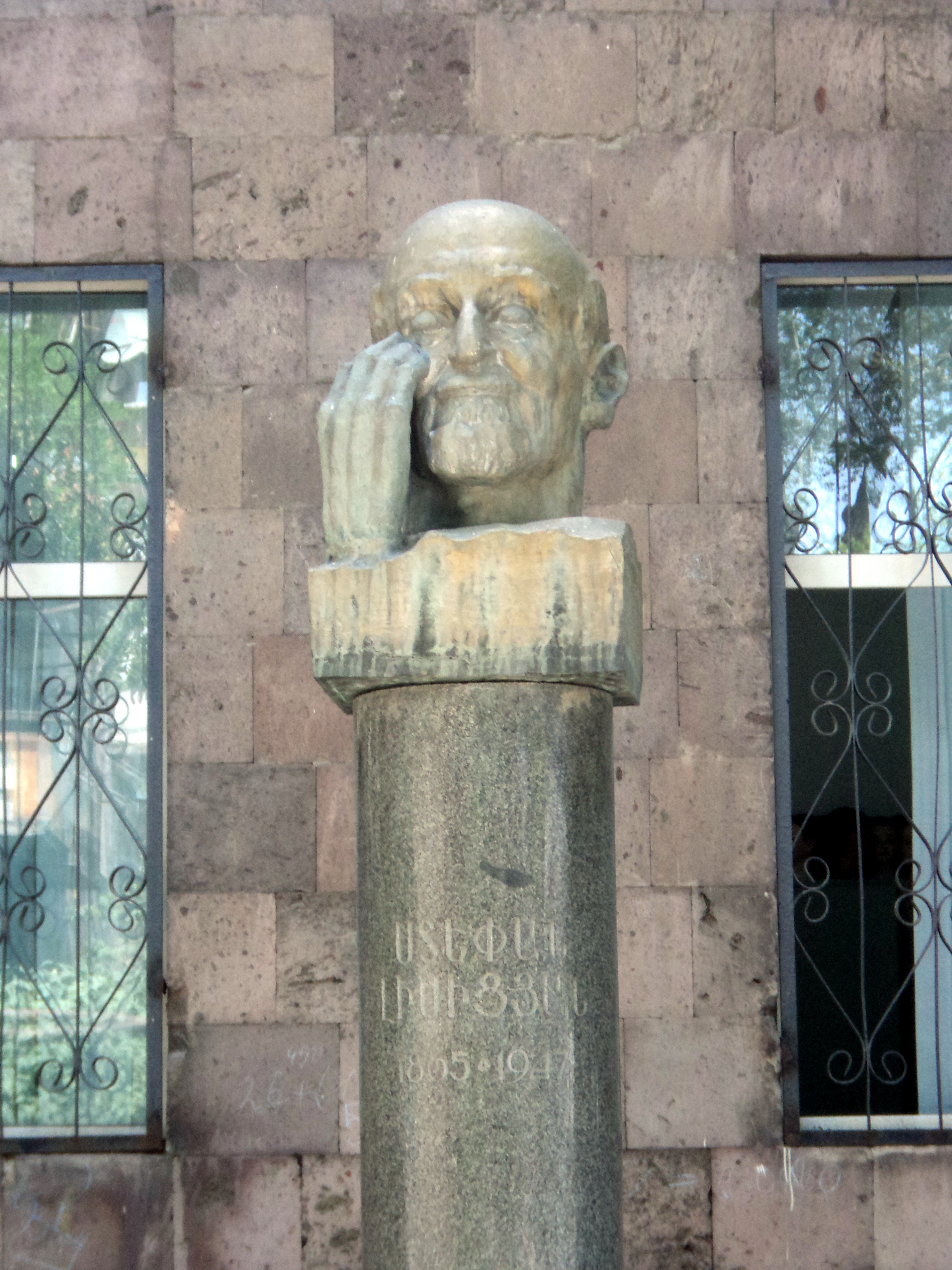 Ստեփան Լիսիցյան-մանկավարժ, թարգմանիչ, ազգագրագետ, բանասեր, պատմաբան, աշխարհագրագետ Քանդակագործ` Ստեփան Լիսիցյան, 1982թ. Գտնվում է նրա անունը կրող դպրոցի բակում 5/14